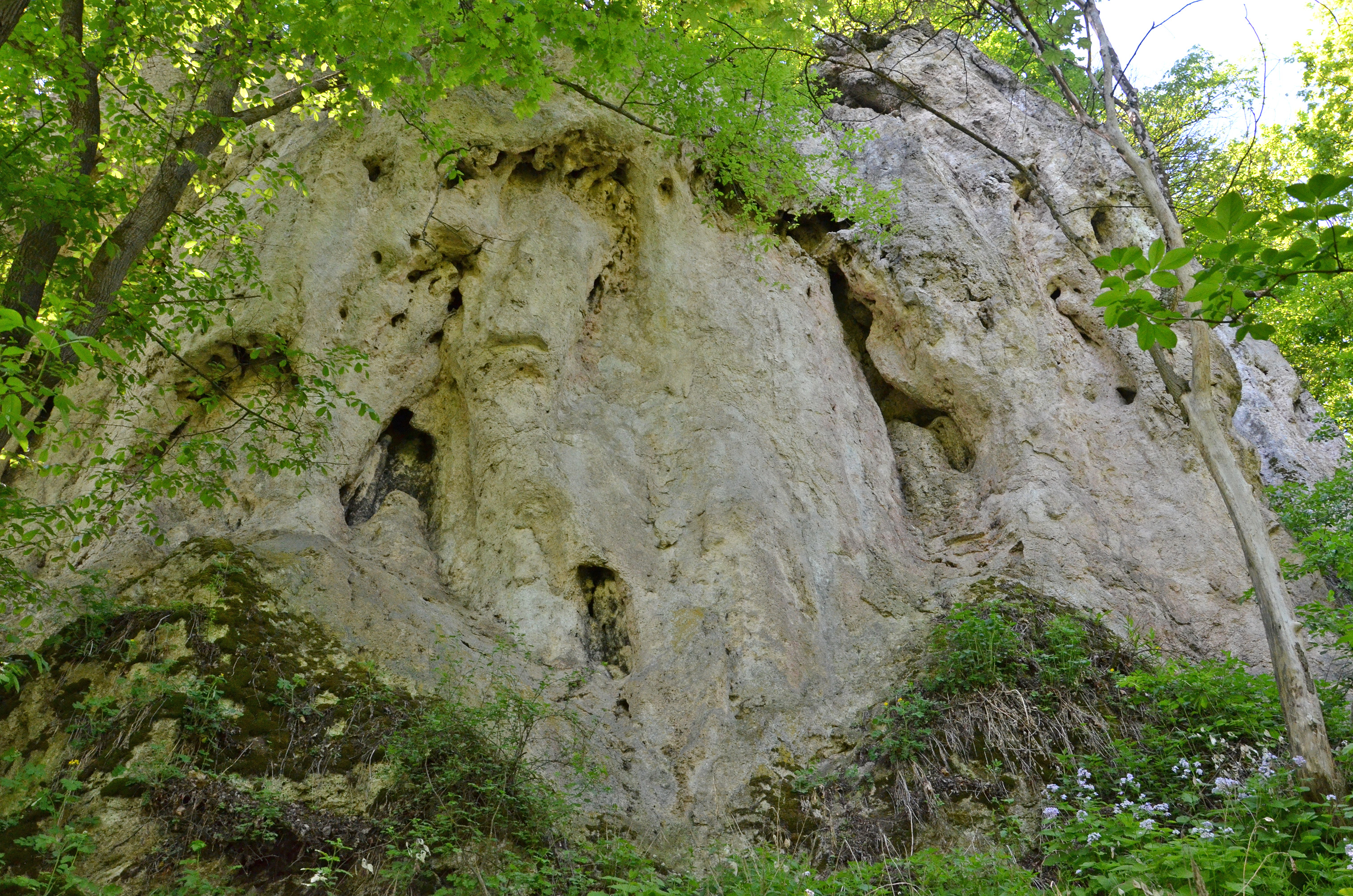 «Монастирська скеля» — геологічна пам'ятка природи місцевого значення в Бучацькому районі Тернопільської області, у кварталі 75 виділі 1 лісового урочища «Язловець» Язловецького лісництва ДП «Бучацьке лісове господарство» на східній околиці с. Сокілець. Вигляд скелі знизу зі схилу.